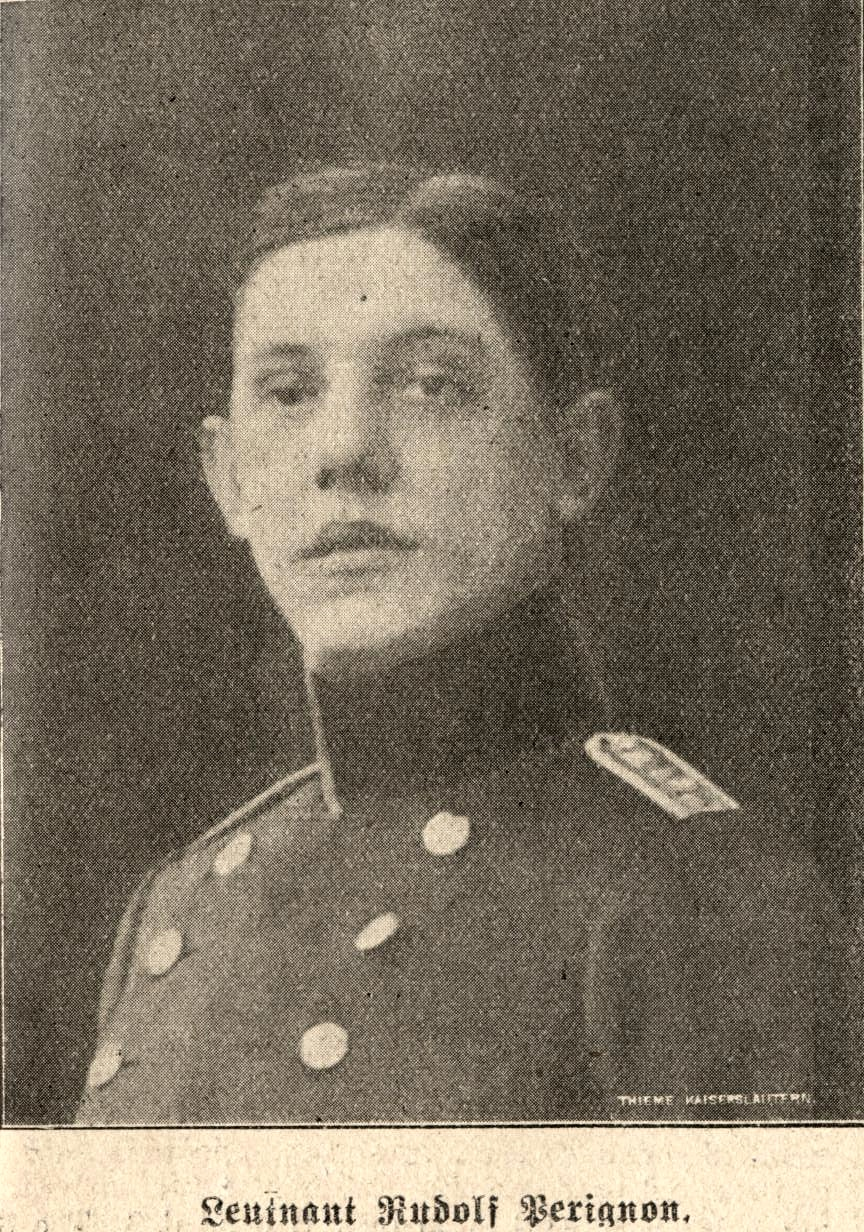 Rudolf von Perignon, Architekt und Max-Joseph-Ritter